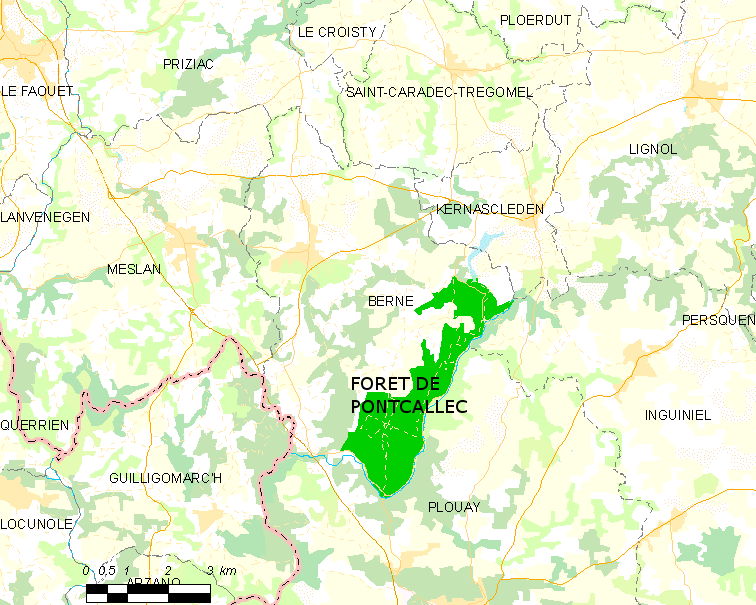 carte de la Forêt domaniale de Pontcallec utilisant comme support le fichier open streetmap